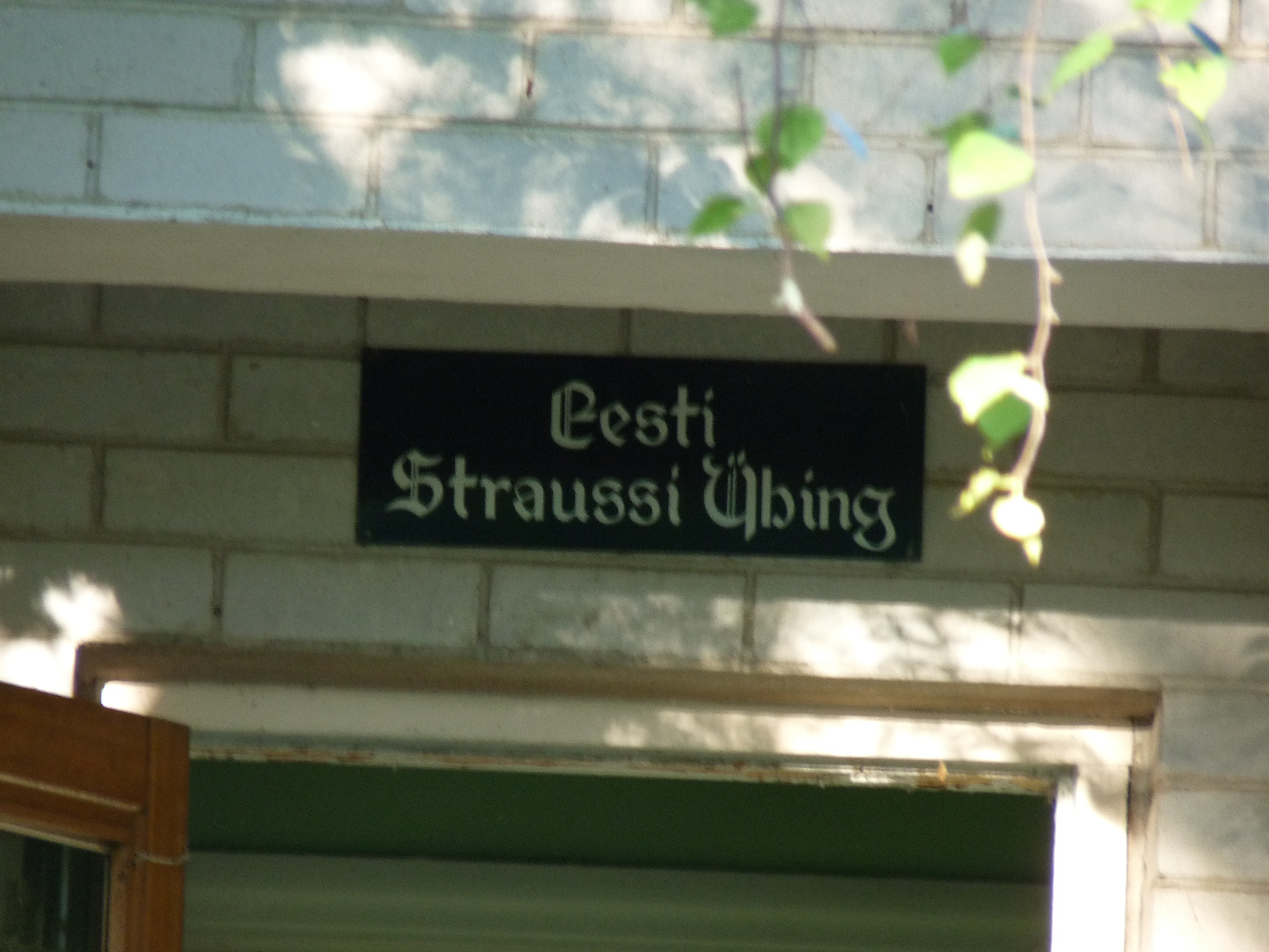 Eesti Straussi Ühingu silt Leopold Hanseni Majamuuseumi ukse kohal Elvas.